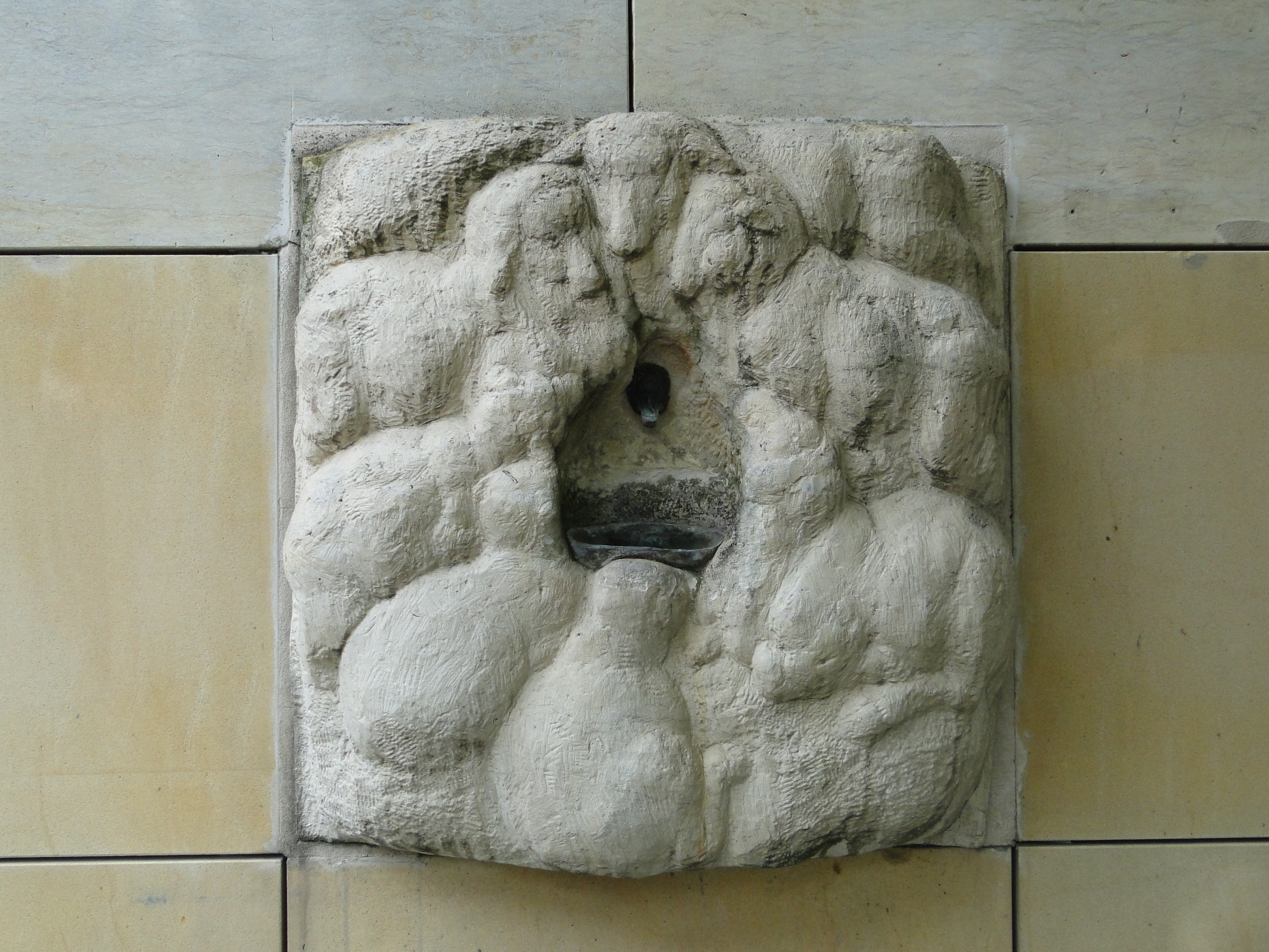 Stillgelegter Schafbrunnen von Charlotte Sommer-Landgraf in Dresden-Gruna